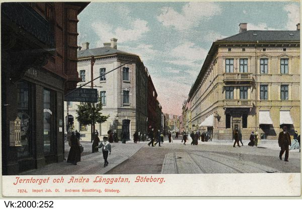 Jerntorget och Andra Långgatan, Masthugget i Göteborg. Andra Långgatan (i fonden), sedd från Järntorget. Vykort, tryckt i färg, med sv/v fotografi som förlaga.